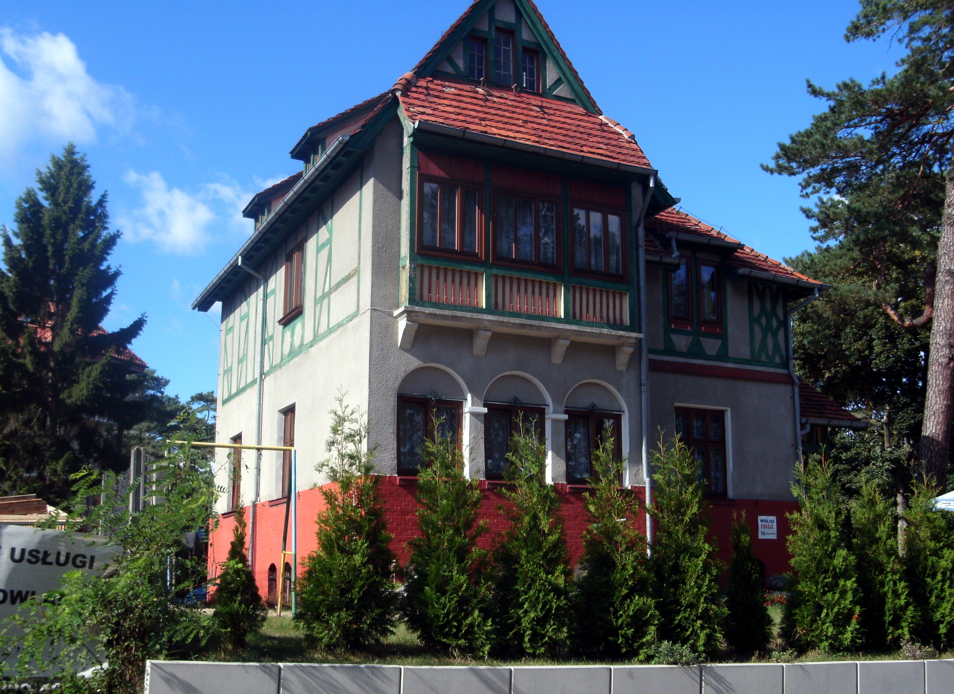 Krynica Morska, ul. Młodzieży 1 (dawniej ul. Młodzieży 2) - willa "Rydz", pocz. XX